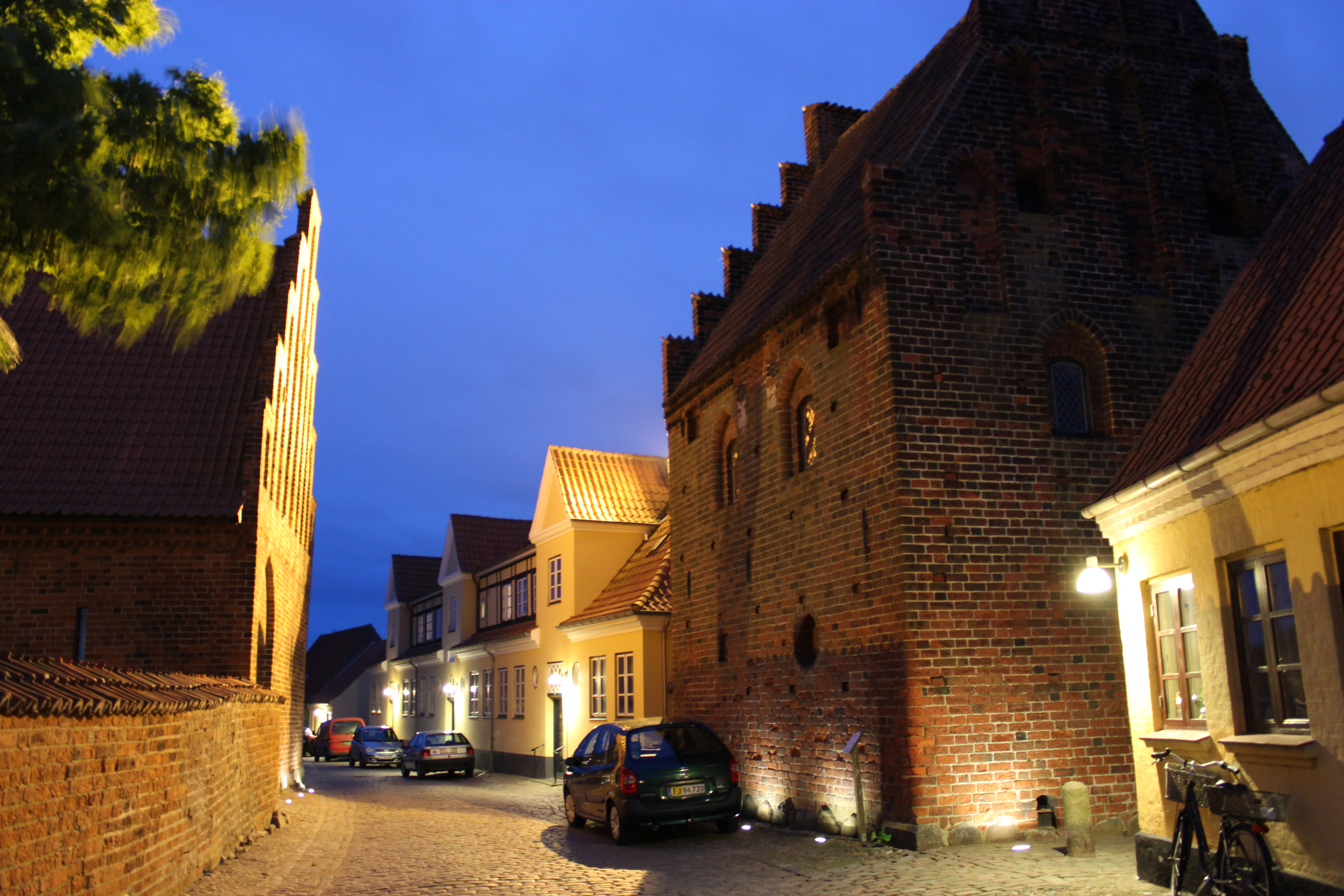 Præstegade med Præstegade 23 og Latinskolen